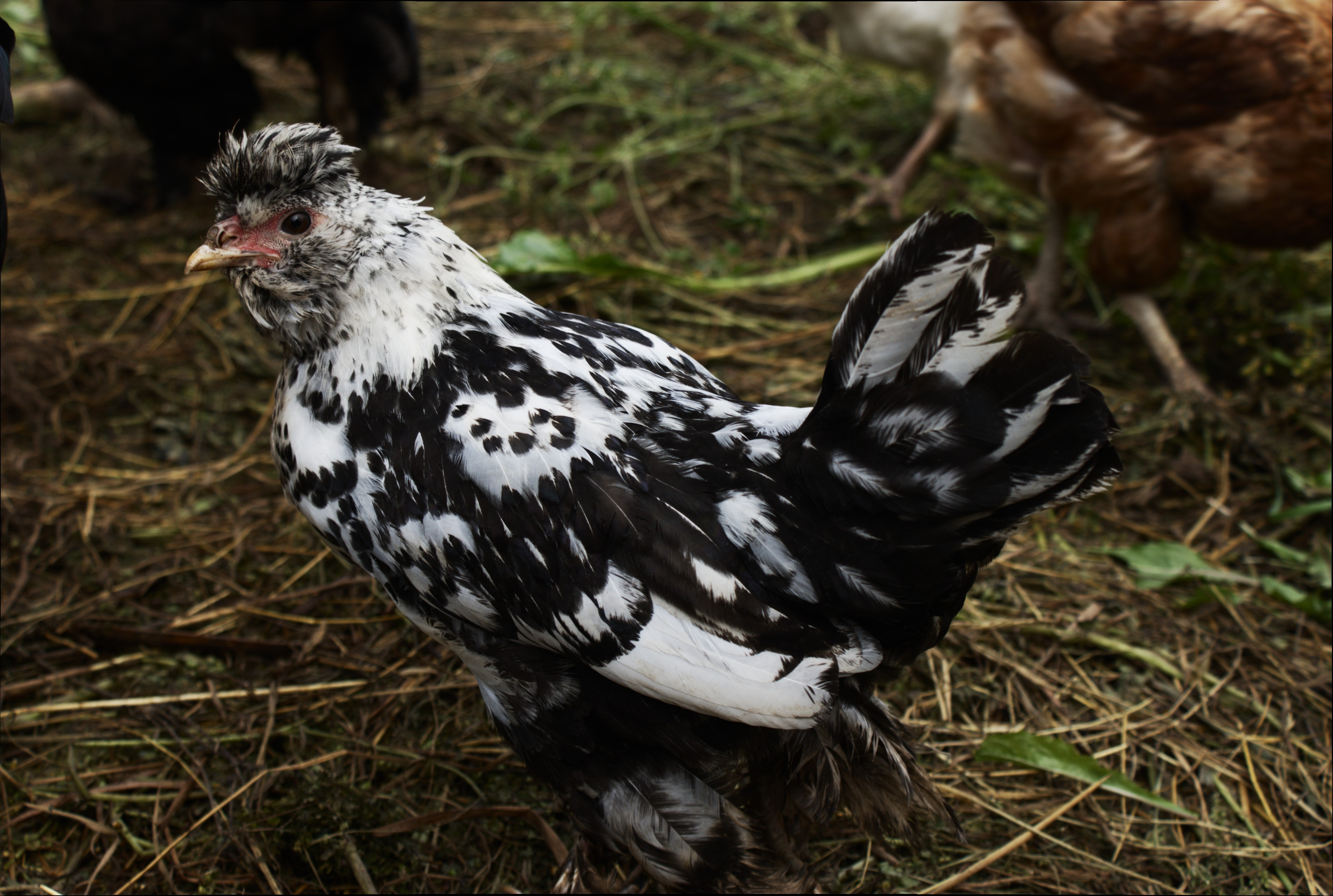 Цыпленок павловской курицы черно-белого окраса (самец).